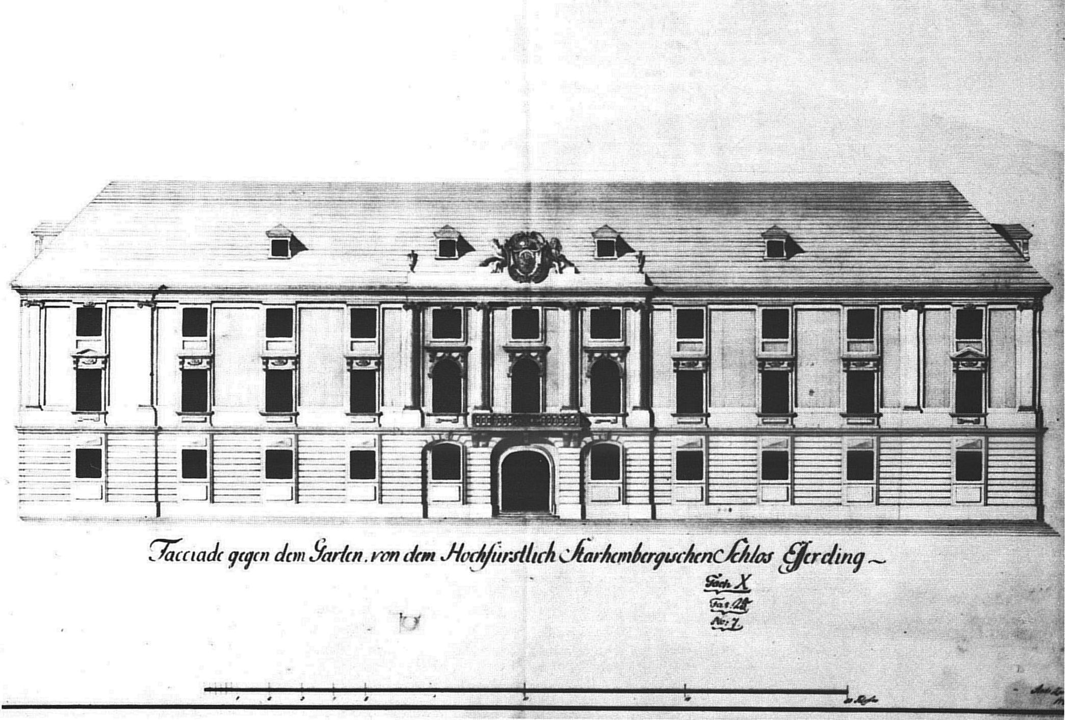 Entwurfszeichnung für die Südfassade des Schlosses Starhemberg in Eferding